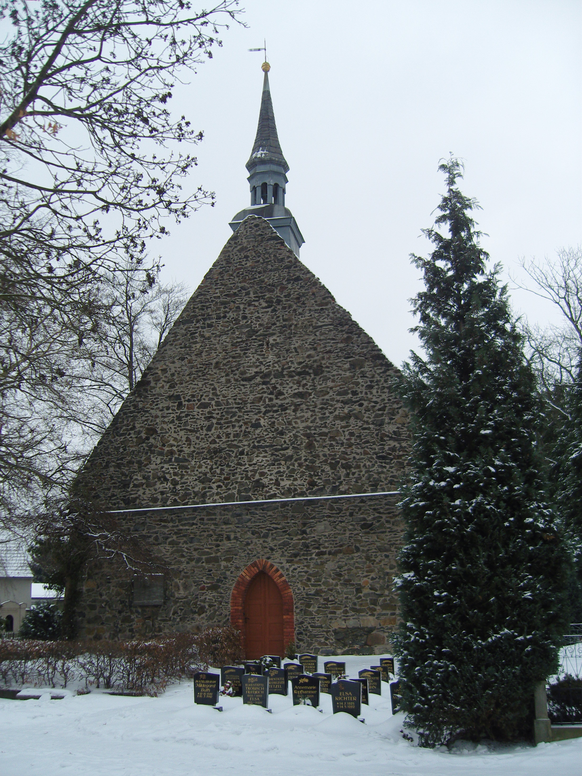 St. Jacobikirche in Ortrand - Baudenkmal